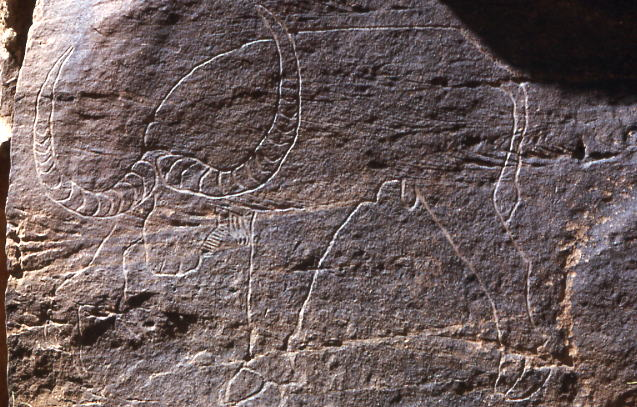 Gravure préhistorique de la région d'El Bayadh, Algérie